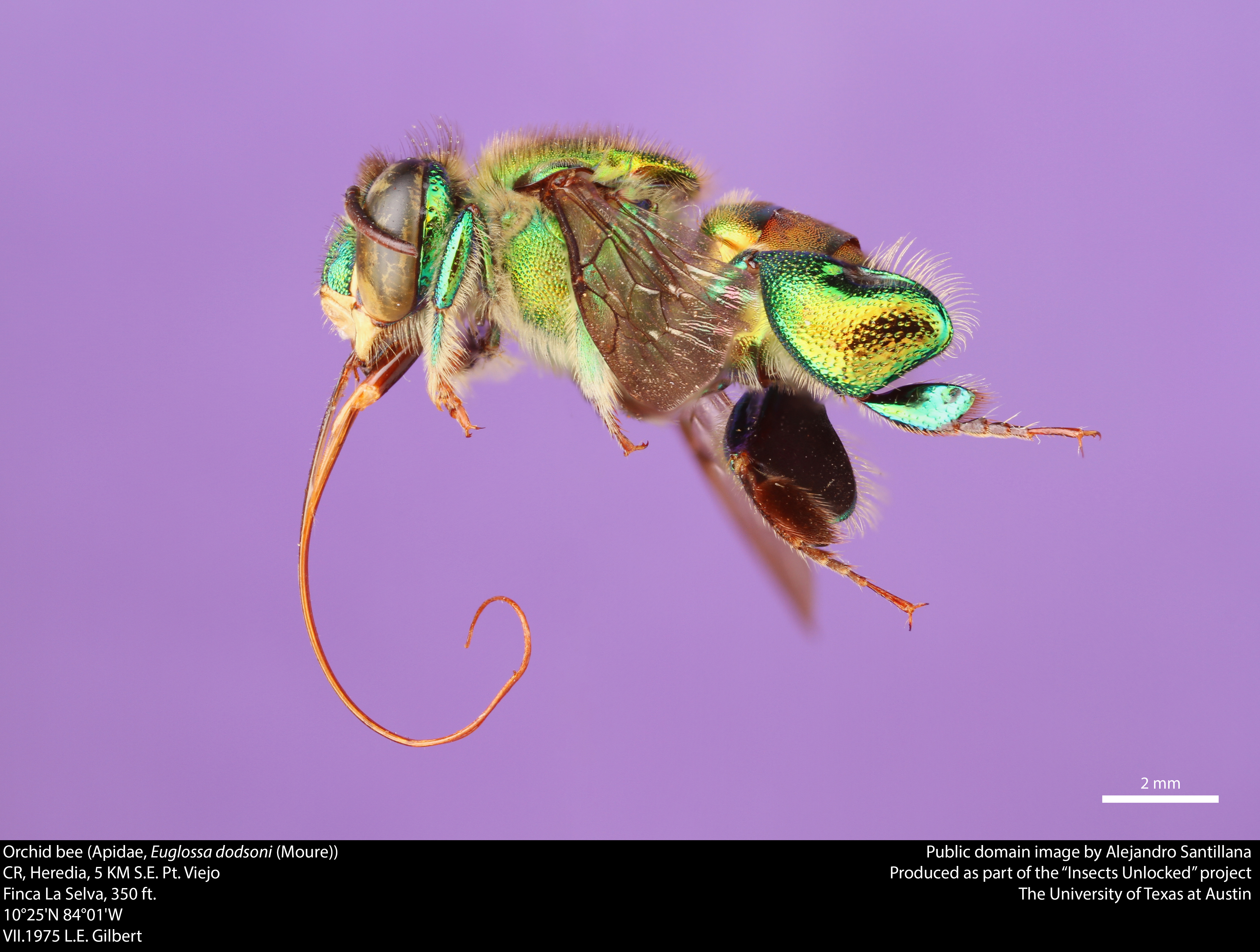 Orchid bee (Apidae, Euglossa dodsoni (Moure)) CR, Heredia, 5 KM S.E. Pt. Viejo Finca La Selva, 350 ft. 10°25'N 84°01'W VII.1975 L.E. Gilbert